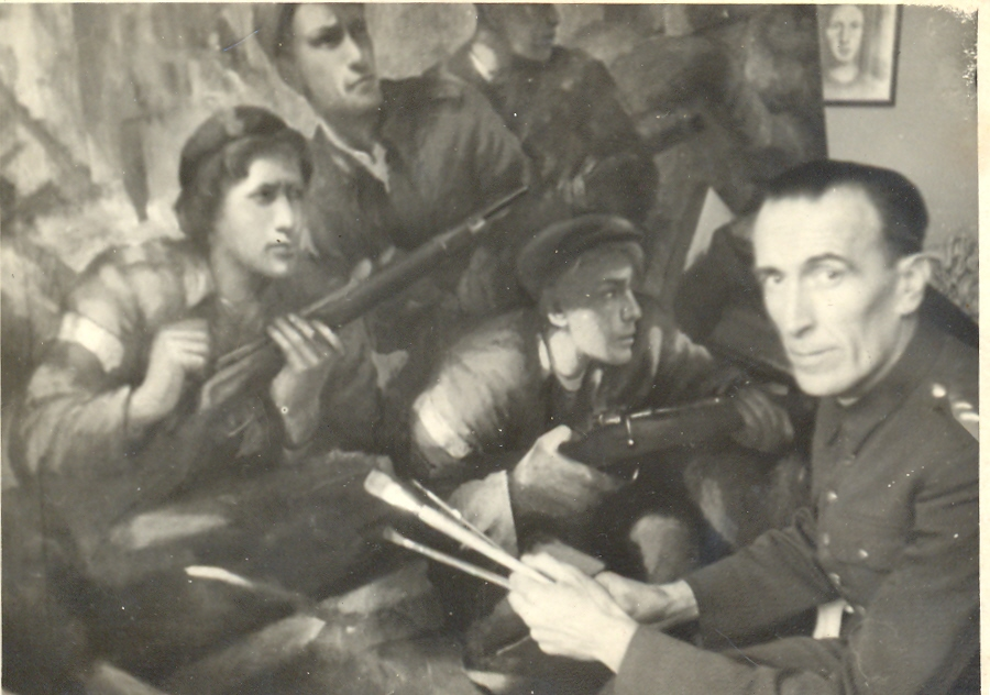 Mieczysław Tomkiewicz w swojej pracowni